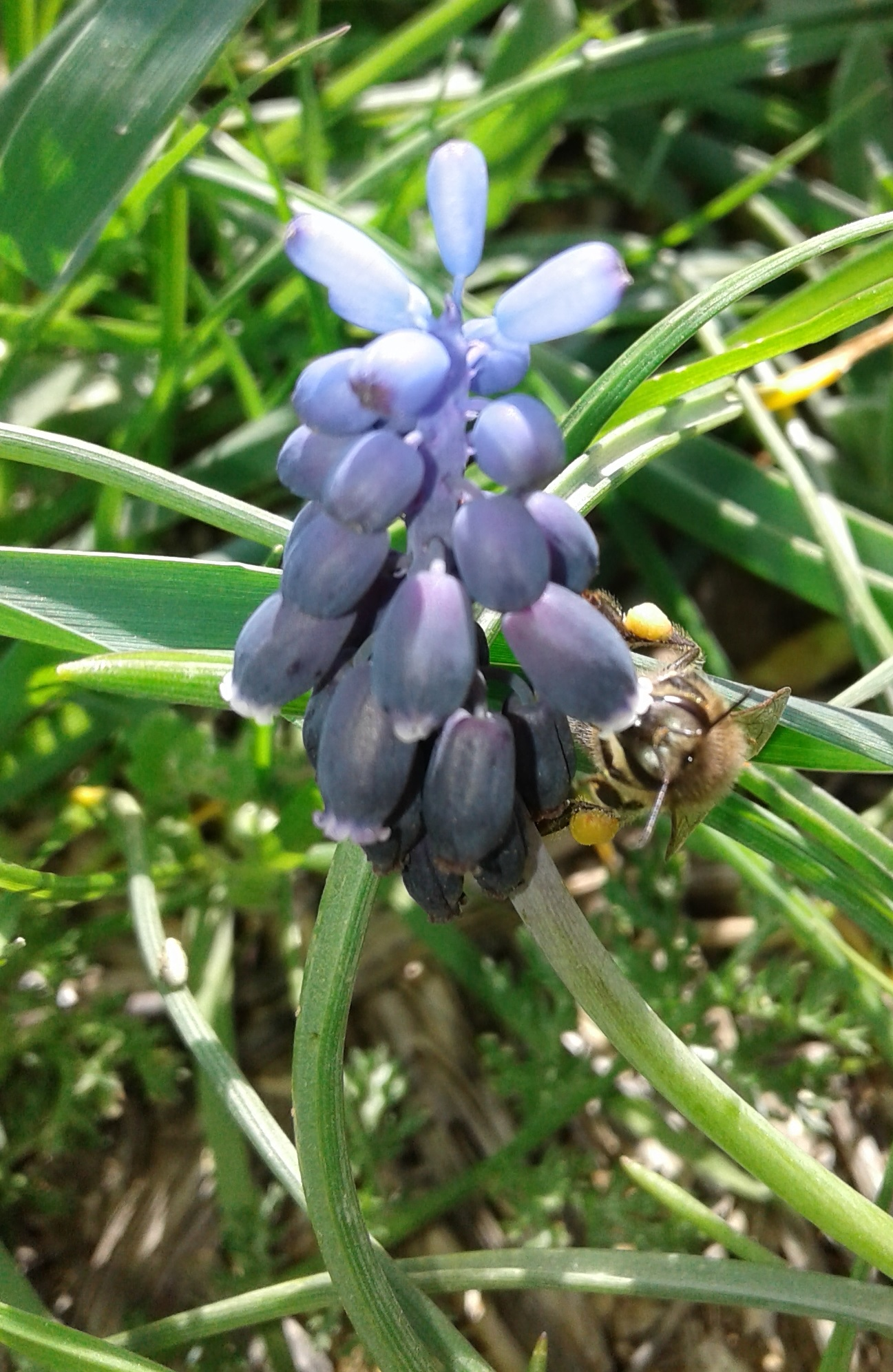 نحلة تلياني ترعى على نبتة بصلة الذئب